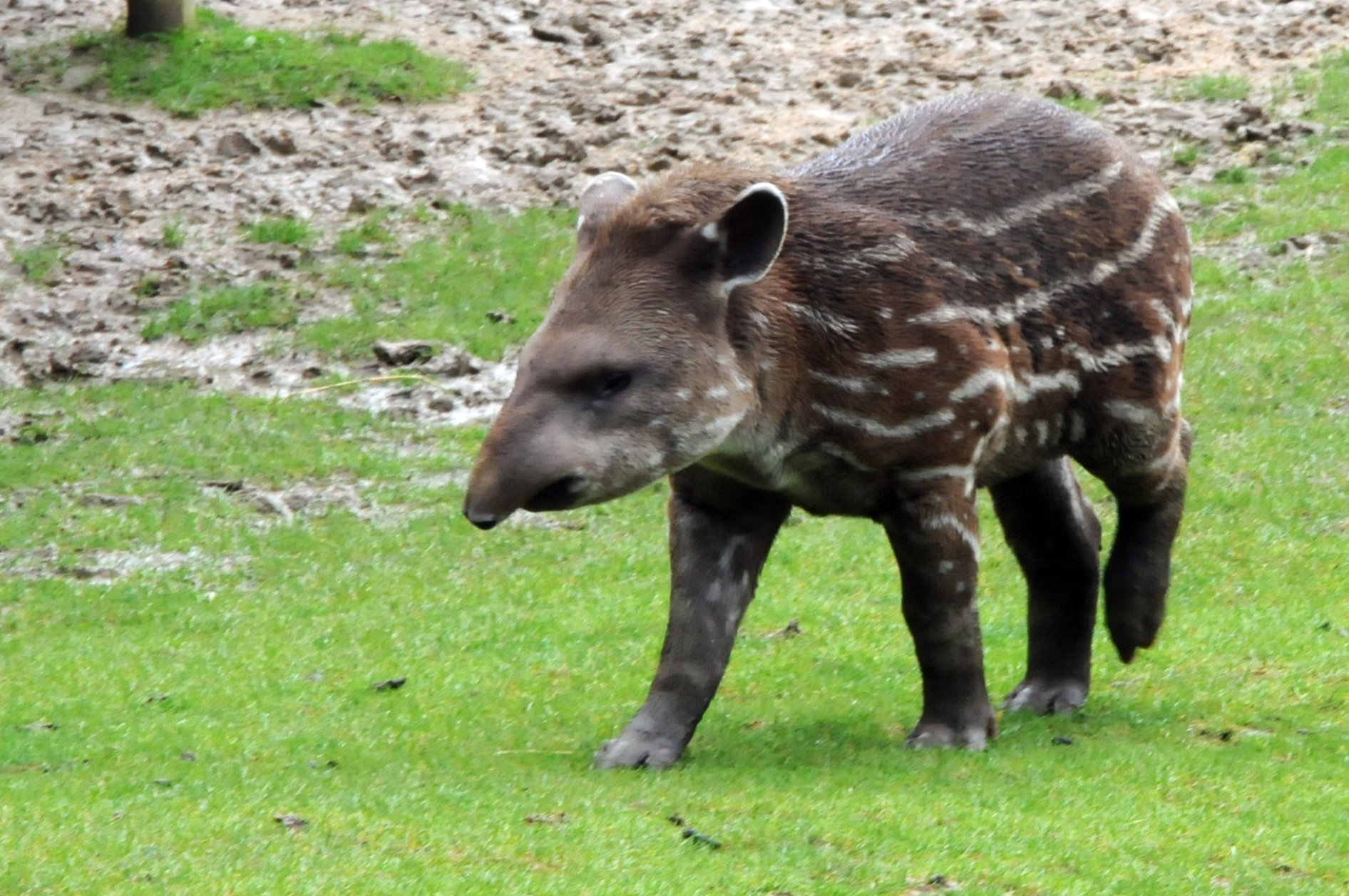 Baby tapir